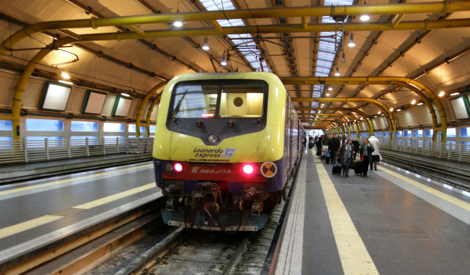 Il treno "Leonardo Express", che collega la stazione di Roma Termini all'aeroporto di Fiumicino. Immagine presa alla stazione di Fiumicino Aeroporto, il treno è trainato da una locomotiva E.464 delle Ferrovie dello Stato